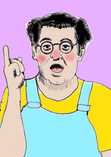 Dessin original représentant l'humoriste Coluche durant les années 1970